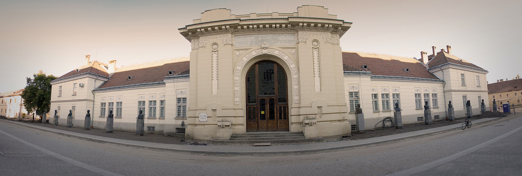 Sala Unirii, fosta Cazină Militară, Alba Iulia, interiorul Cetăţii Alba Carolina